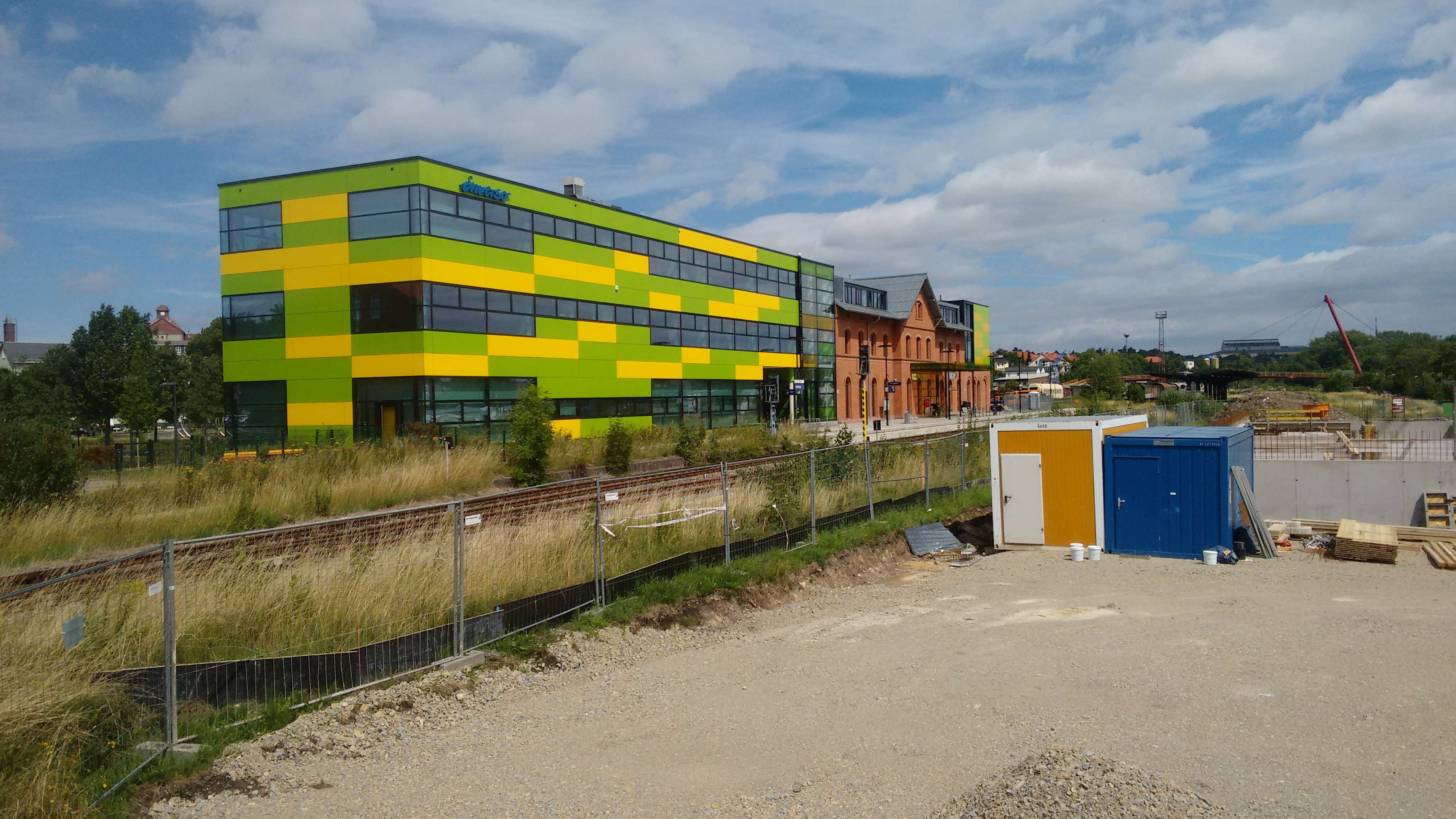 Blick auf den Bahnhof Ilmenau von der Langewiesener Straße aus. Im Vordergrund ist die Baustelle von Terminal C zu sehen.